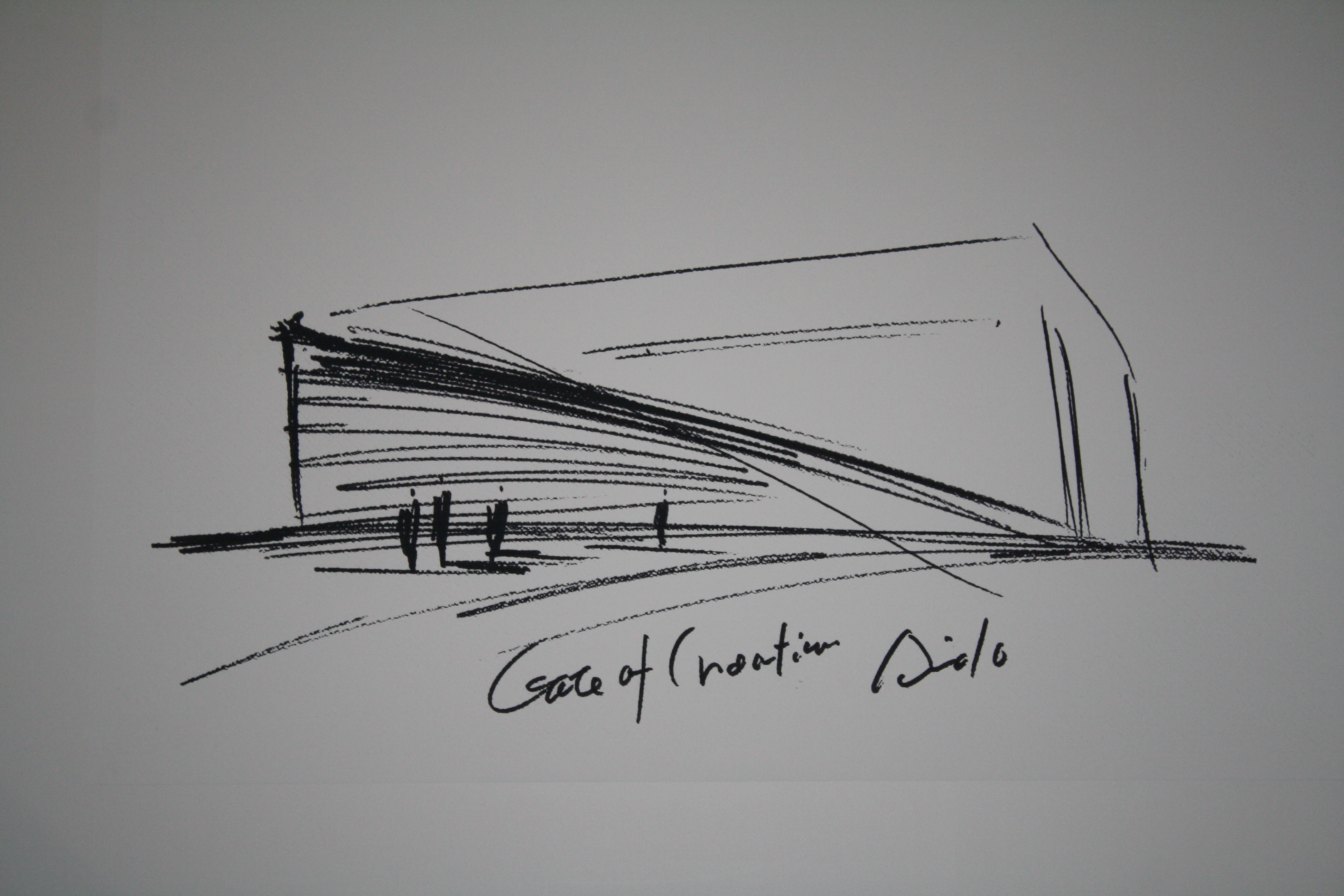 gate of creation